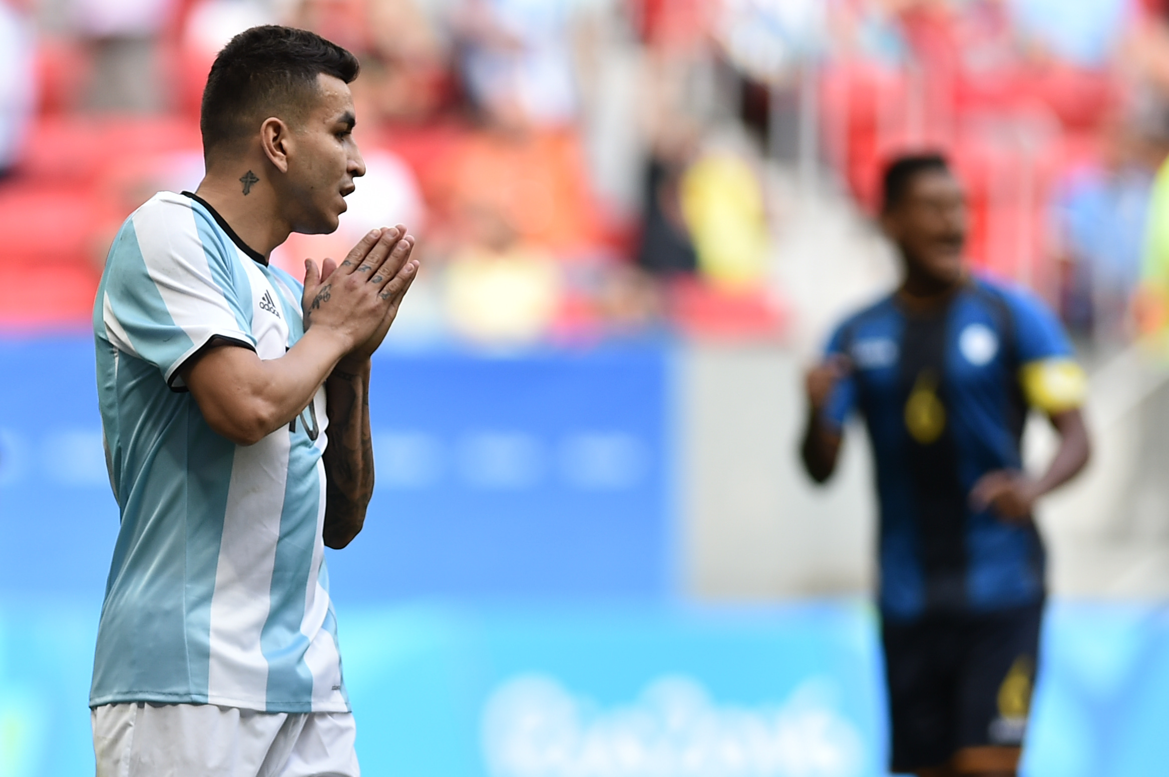 Estádio Nacional de Brasília Mané Garrincha, Brasília, DF, Brasil, 10/8/2016 Foto: Andre Borges/Agência Brasília Argentina e Honduras empataram por 1x1 nesta quarta-feira (10), no Estádio Mané Garrincha, em partida pelo grupo D do futebol masculino nas Olimpíadas 2016. O placar classificou Honduras para a próxima fase da competição e tirou a seleção argentina masculina da Olimpíada. Partido entre Argentina y Honduras por fase de grupos.